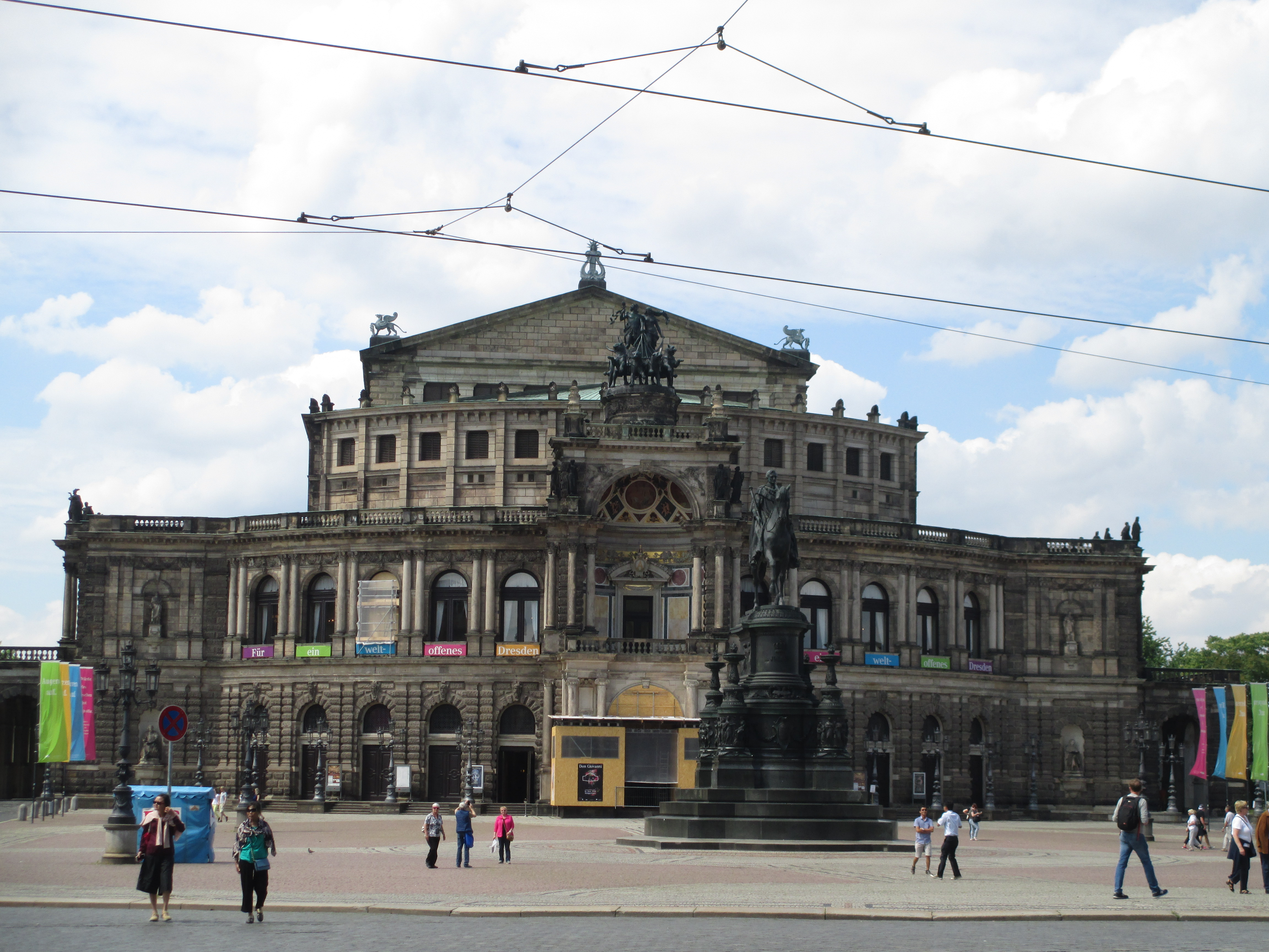 בית האופרה של דרזדן. לפניו - פסל של יוהאן, מלך סקסוניה